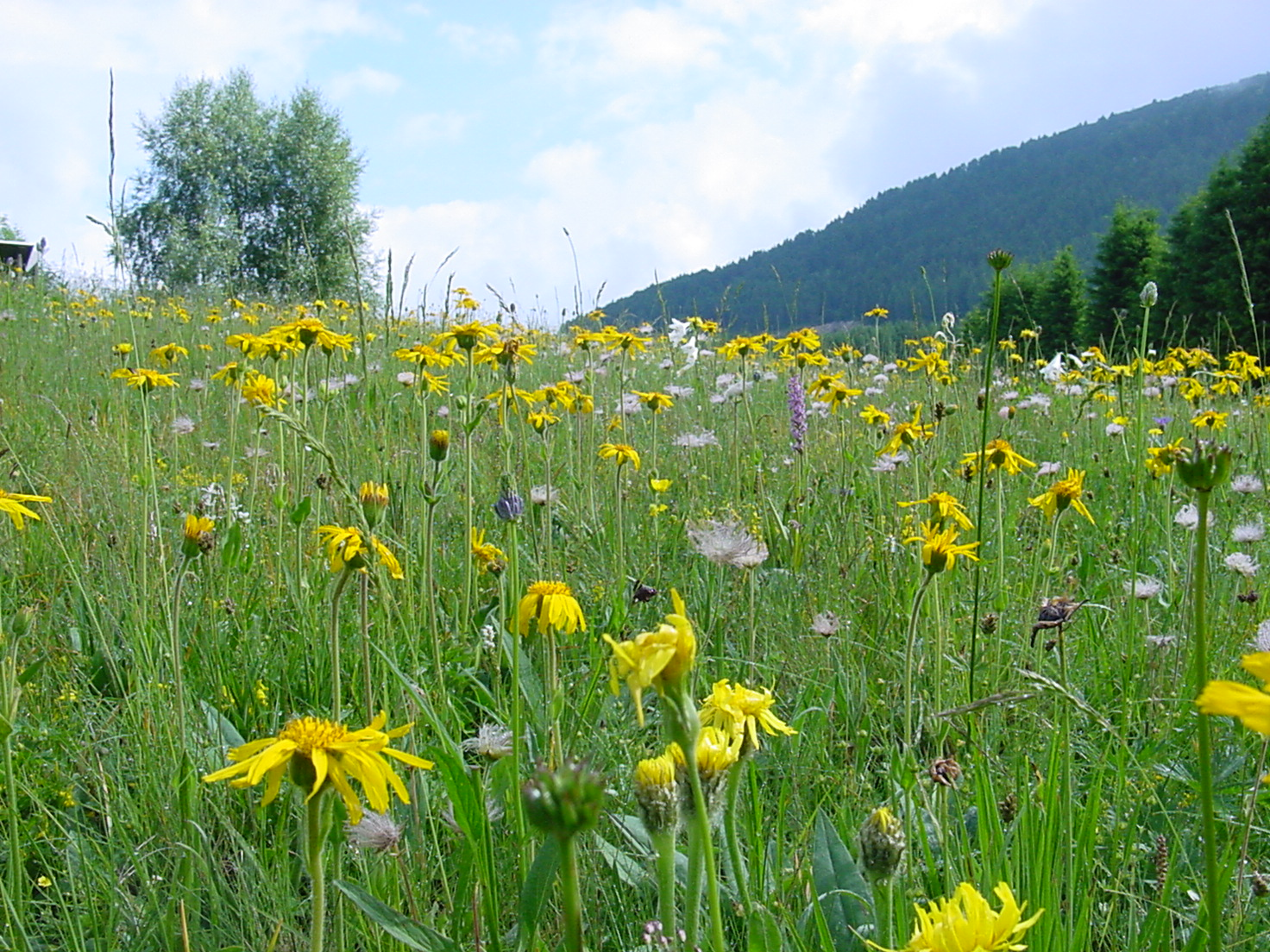 Prateria fiorita